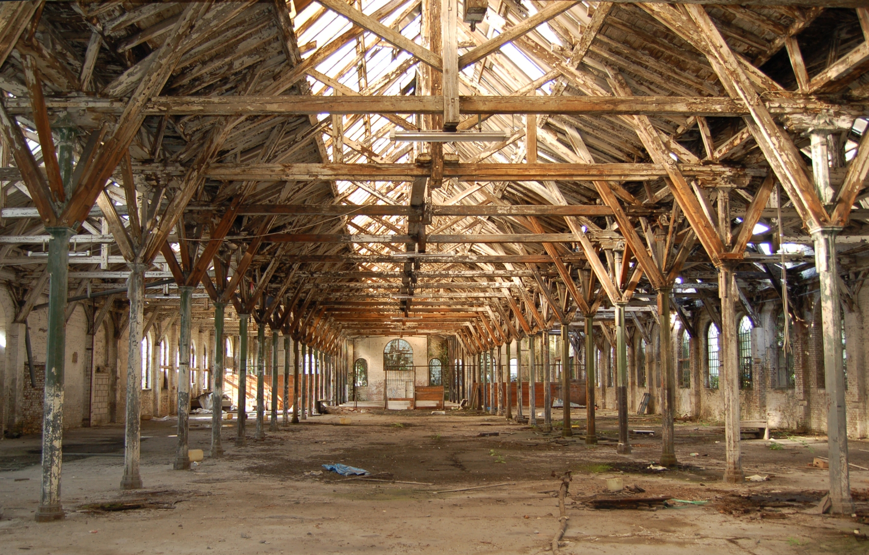 Bild des Ständerwerks im Inneren der Alten Dreherei in Mülheim an der Ruhr